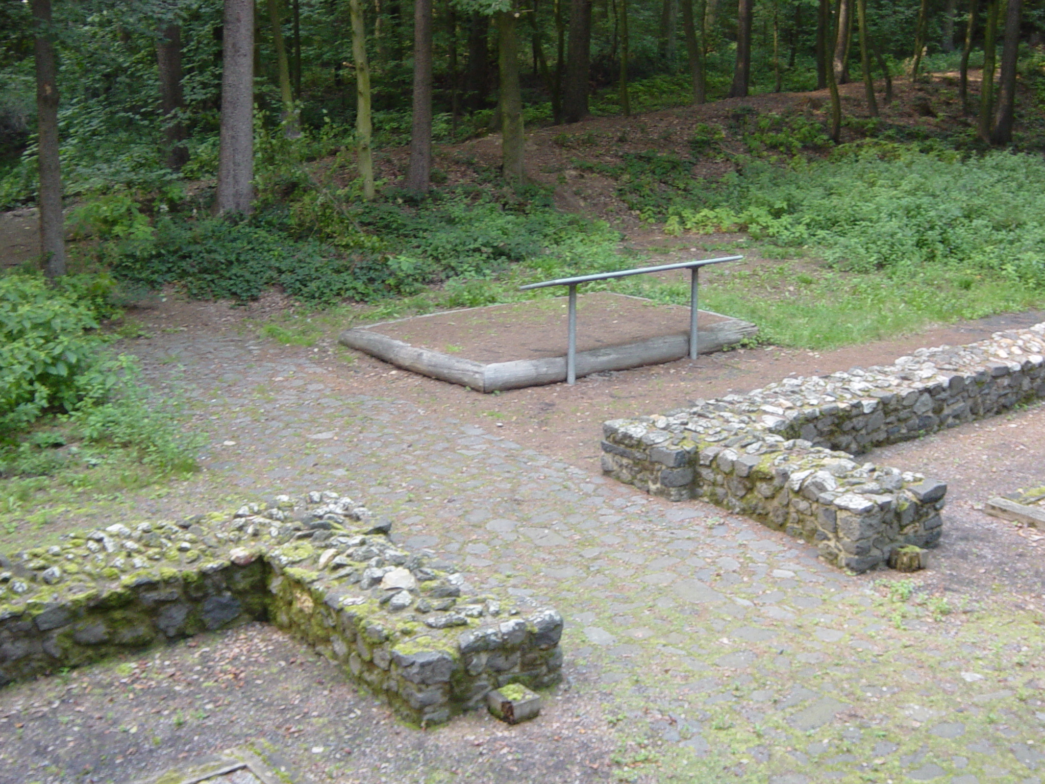 Römisches Kleinkastell am Obergermanisch-Raetischen Limes, Blick Richtung Norden auf den Limeswall